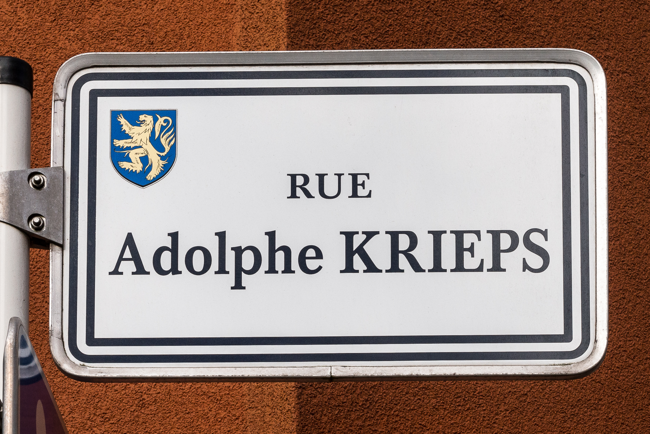 Stroosseschëld zu Déifferdeng.